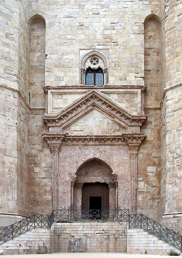 Castel Del Monte near Andria in Puglia, Italy